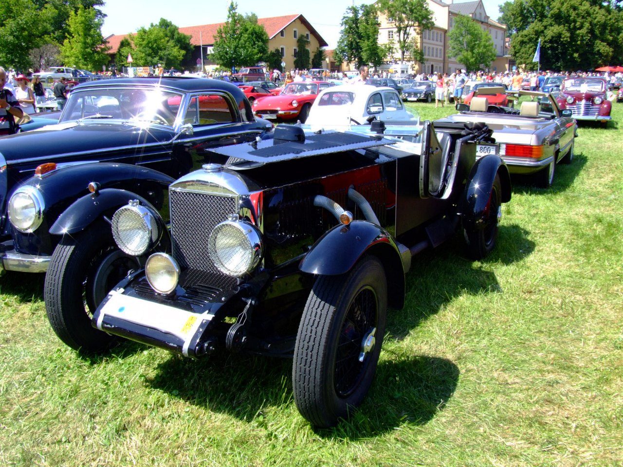 Invicta TypA 1930 Baujahr: 1930 6 Zylinder 4,5 Liter-Motor/Engine 85 kw